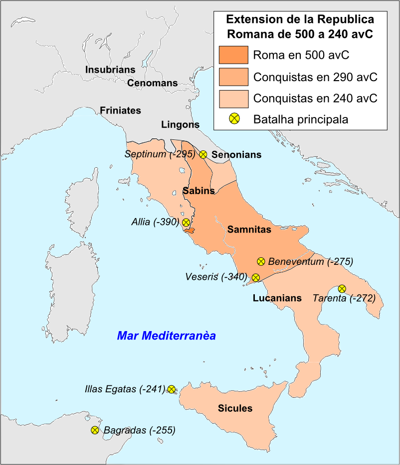 Extension de la Republica Romana de 500 a 240 avC.